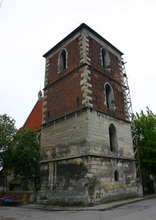 Polska